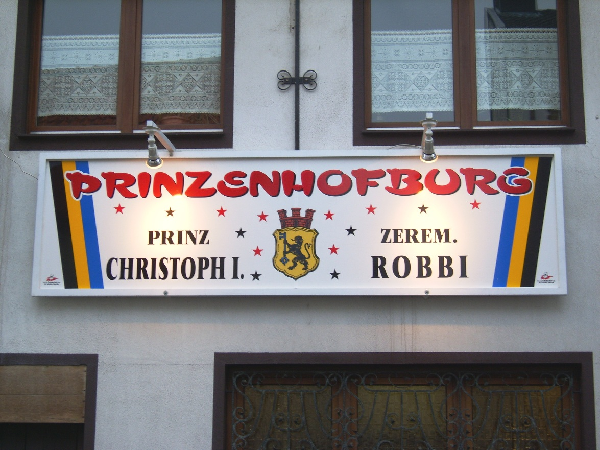 Schild der Eschweiler Prinzenhochburg 2007 bei Lersch in der Dürener Straße in der Eschweiler Altstadt zum Eschweiler Karneval